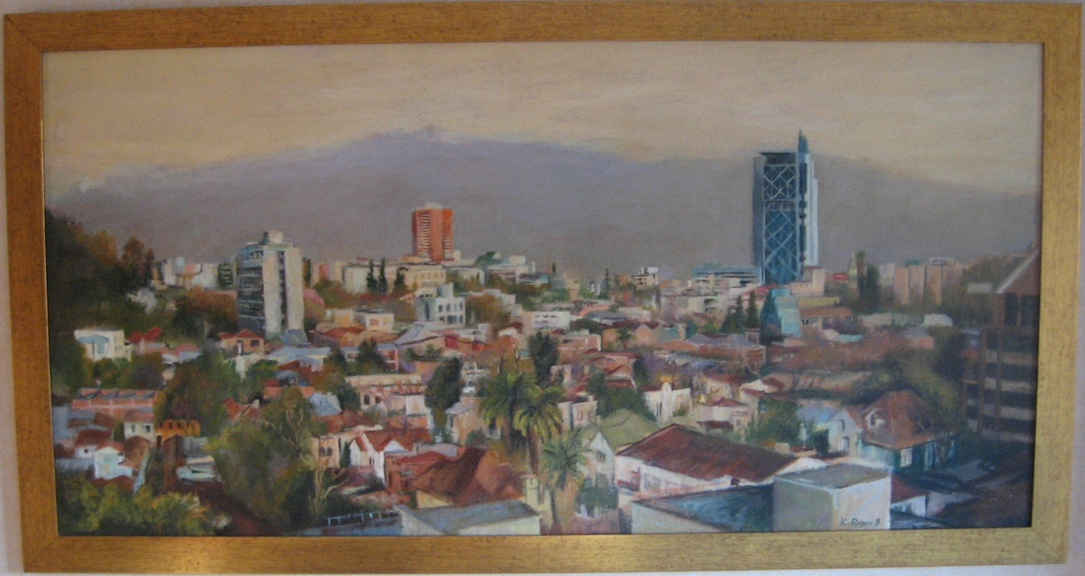 Bellavista Santiago Chile